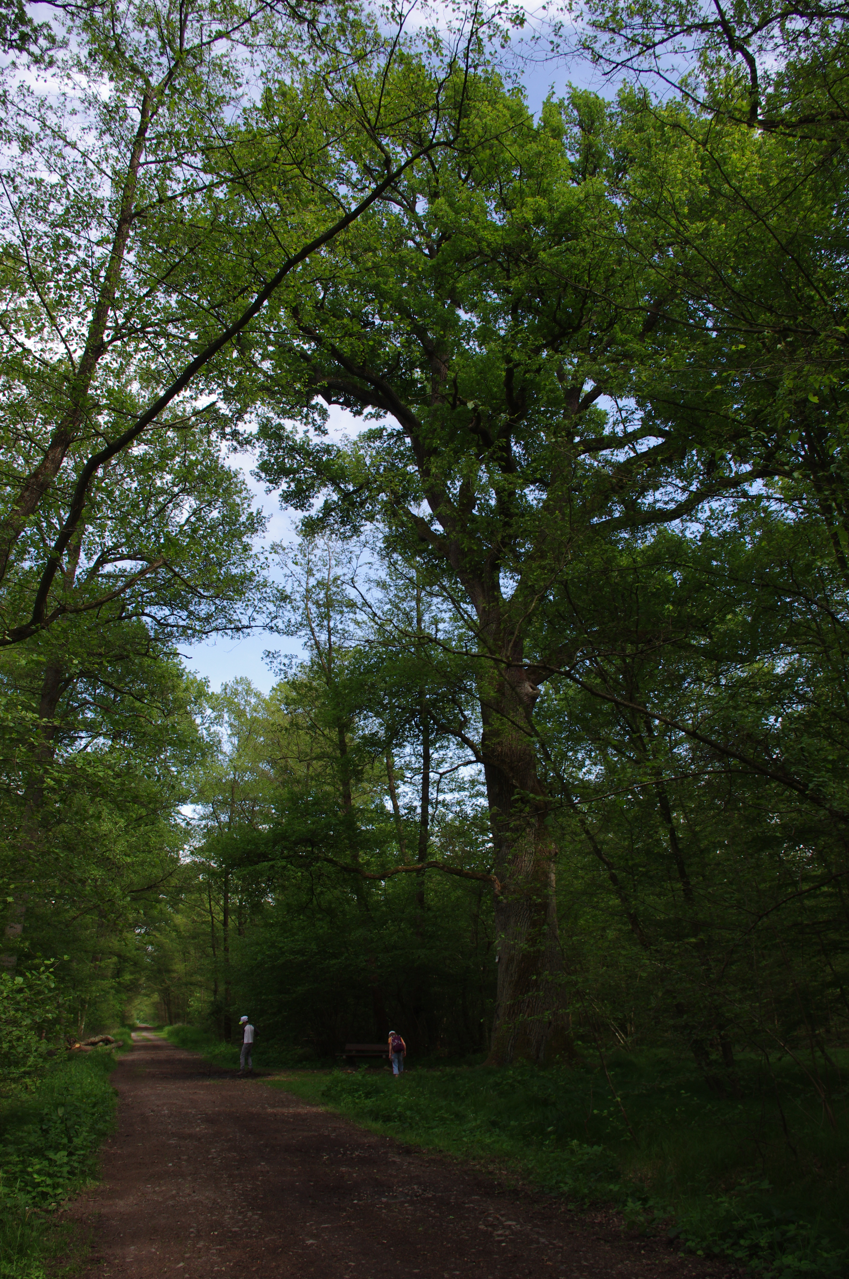 arbre remarquable, haut-rhin, france